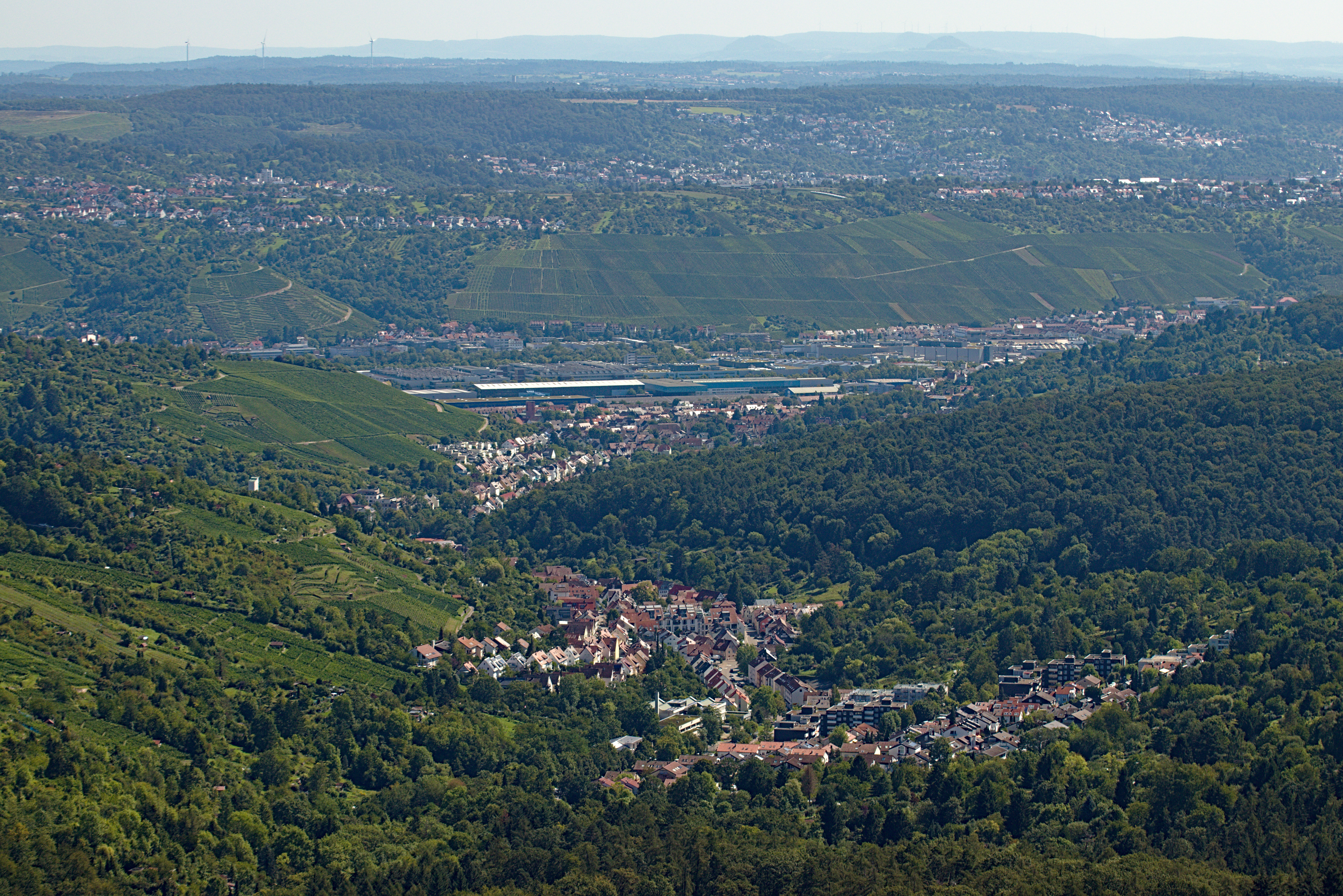 Blick vom Fernsehturm Stuttgart nach Osten über Rohracker, Hedelfingen und Obertürkheim